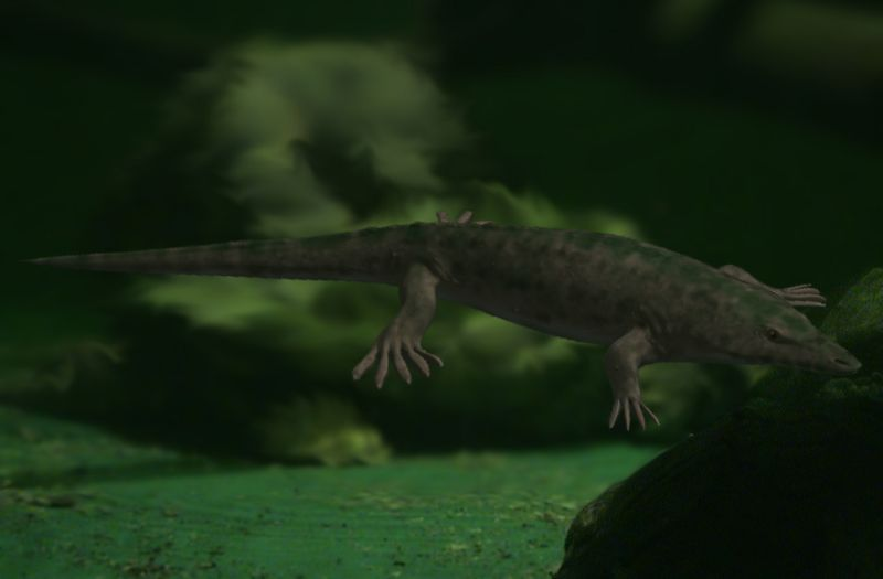 Archegosaurus decheni, digital